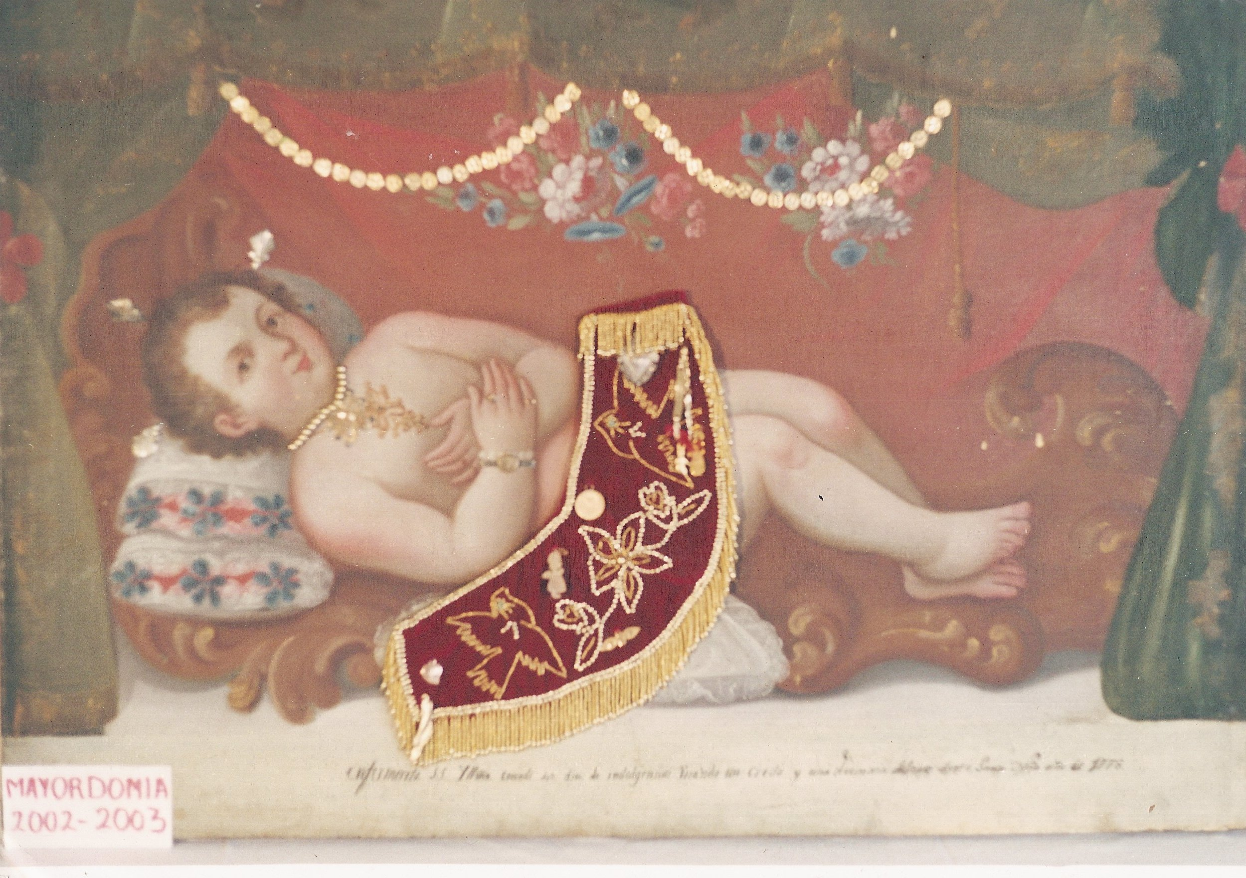 Imagen que se venera en Guadalupe Yancuictlalan, Edo. Méx. México